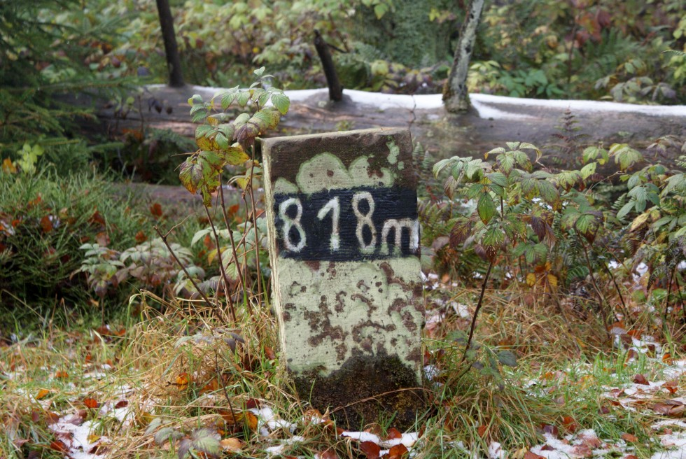 Gipfelstein auf der Hunau